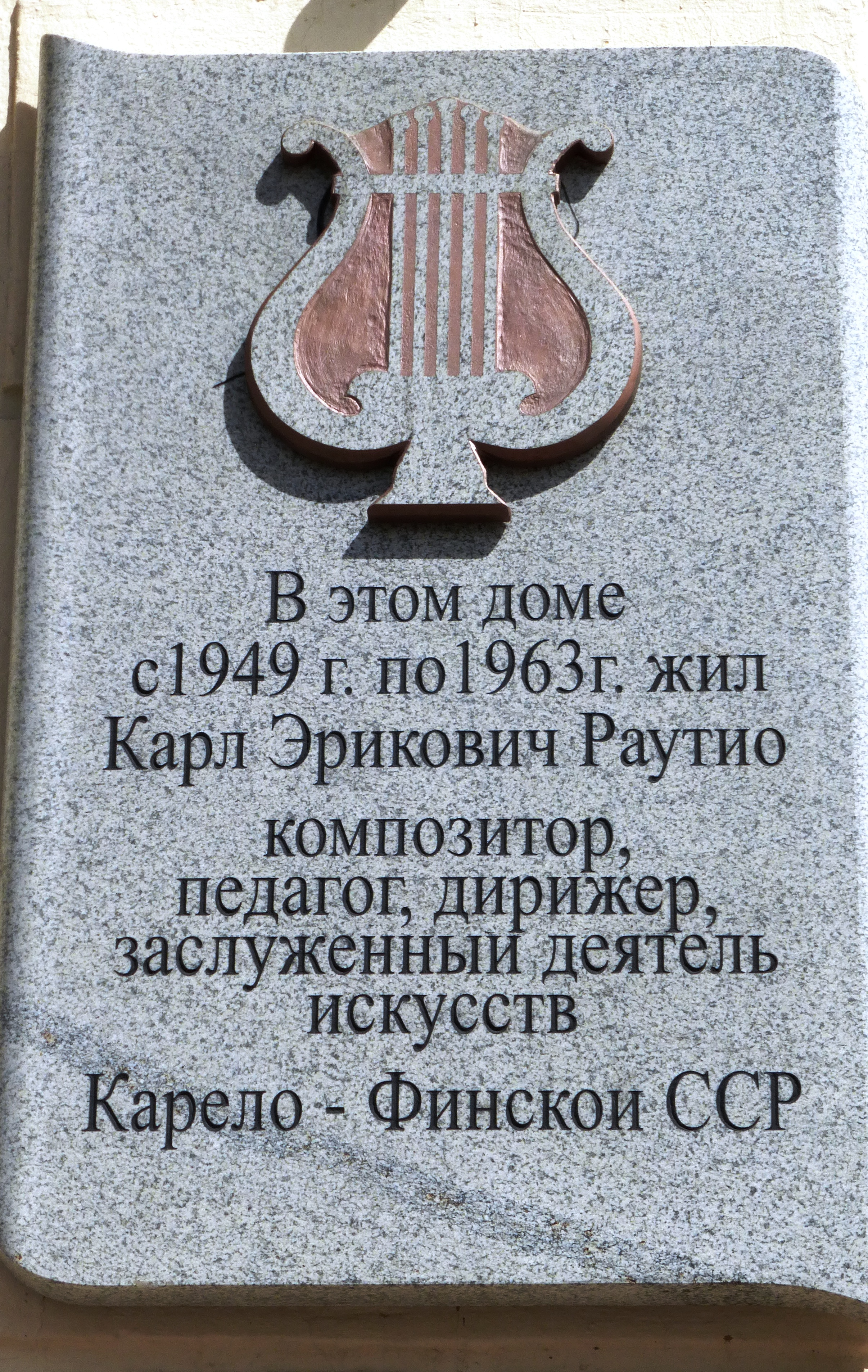 Памятная доска Раутио Карлу Эриковичу в Петрозаводске на здании по ул.Кирова, 24.